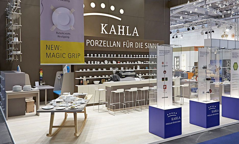 KAHLA Messestand auf der Internorga Messe Hamburg 2014 KAHLA Porcelain Internorga Fair, Hamburg, 2014